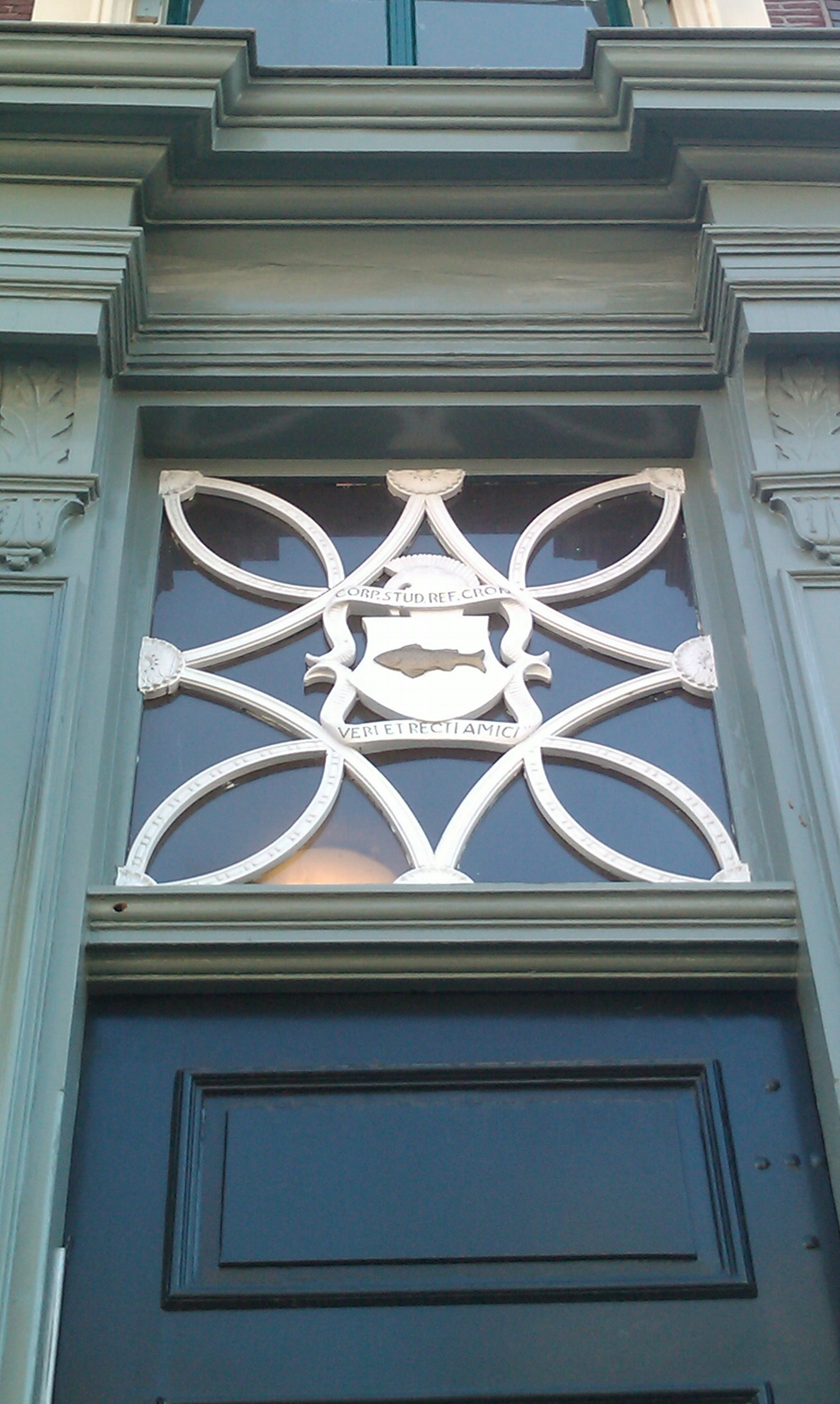 Het beeldmerk van Vera boven de deur van het pand aan de Oosterstraat (in de stad Groningen) is zo'n beetje het enige dat nog herinnert aan de oude SSR-tijd.